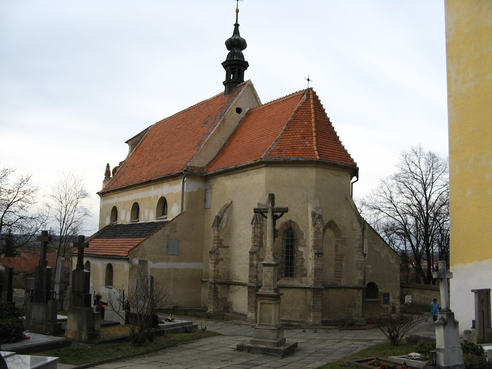 Kostel sv. Petra a Pavla (Vřesovice), Vřesovice